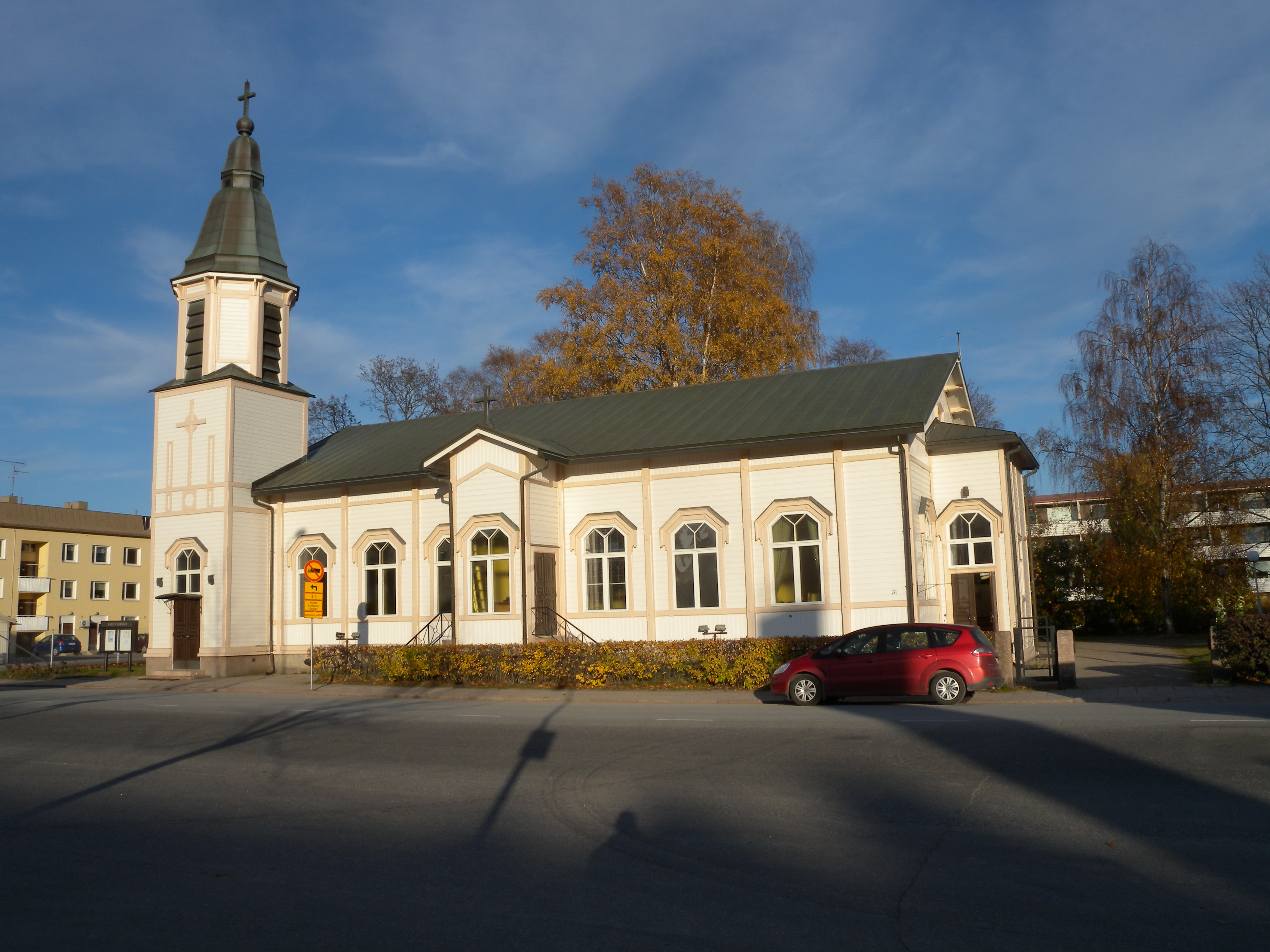 Salon kirkko, Kirkkokatu 7